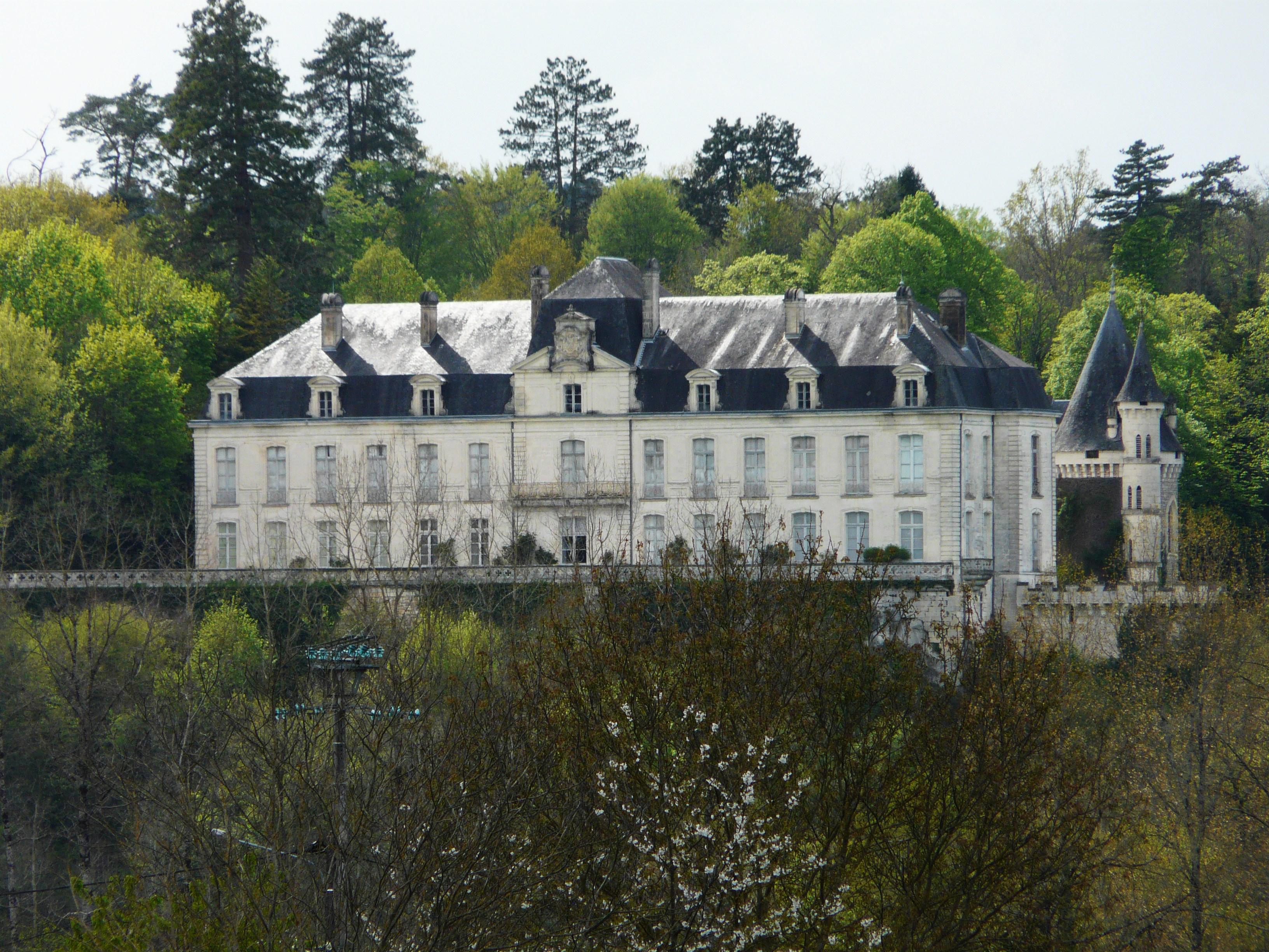 Le château de Vaugoubert, Quinsac, Dordogne, France Object location45° 25′ 28.3″ N, 0° 41′ 47.3″ E